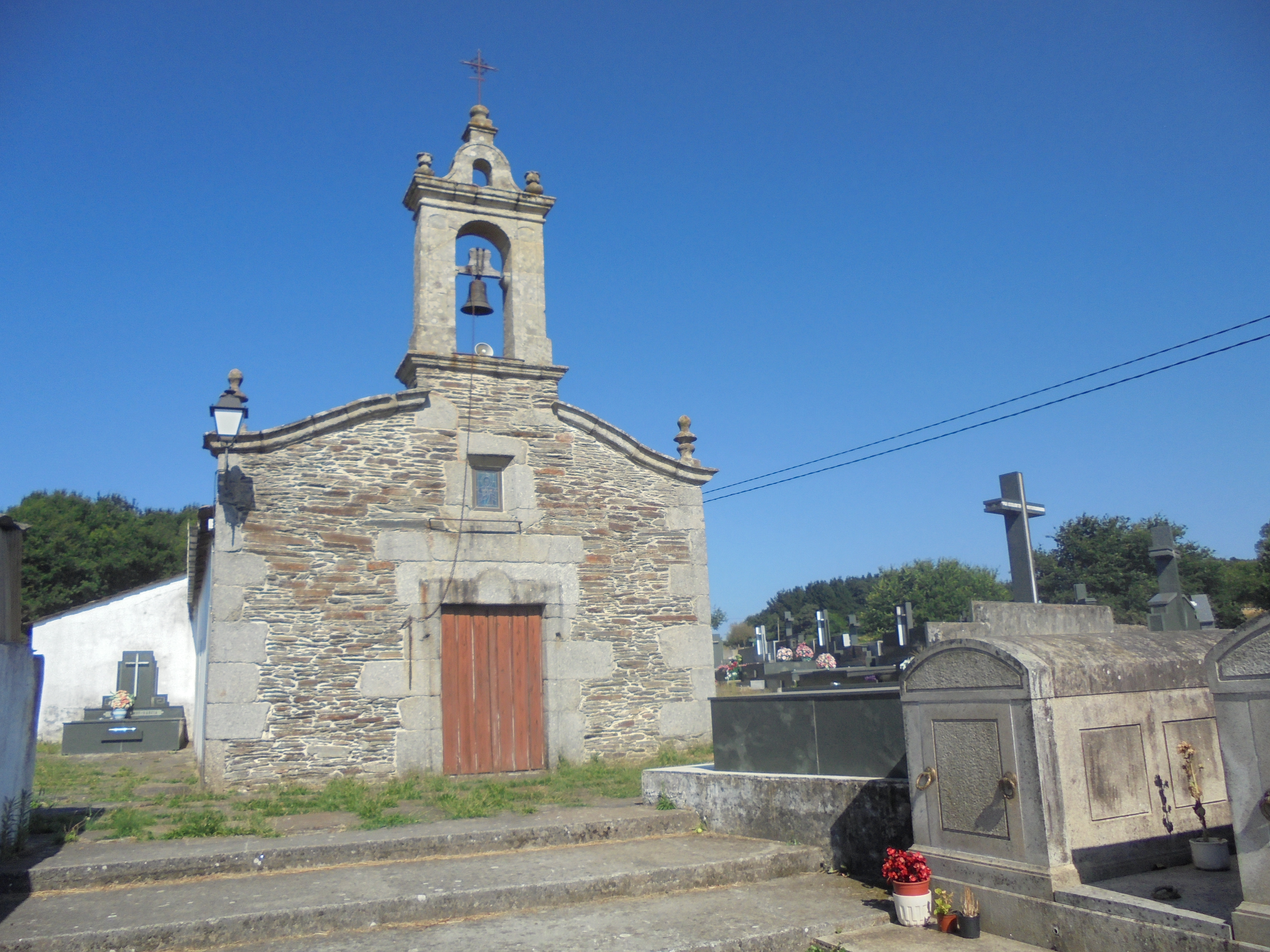 Igrexa parroquial de San Mamede dos Anxos ( Lugo)